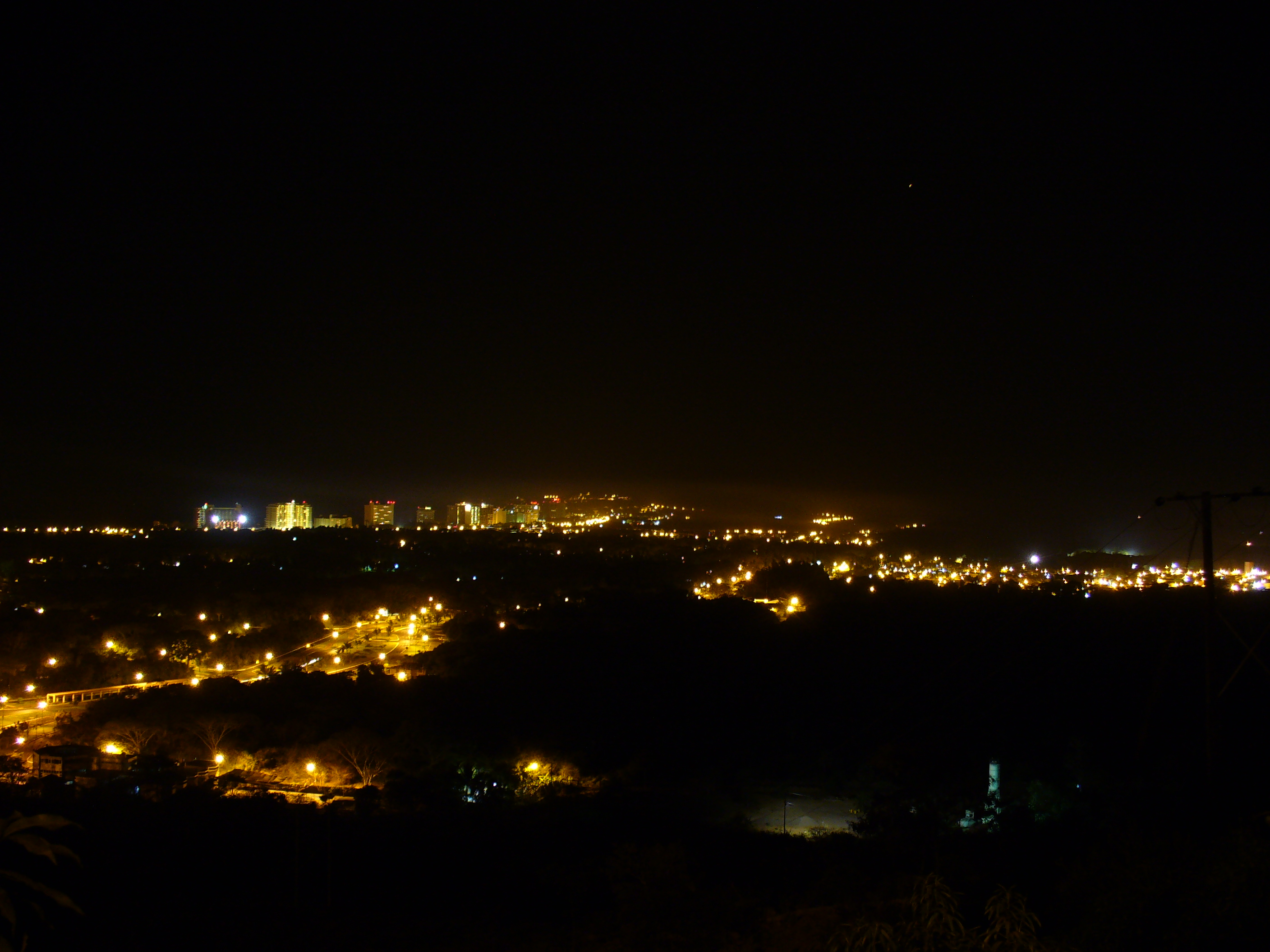 Vista nocturna desde el mirador de Ixtapa